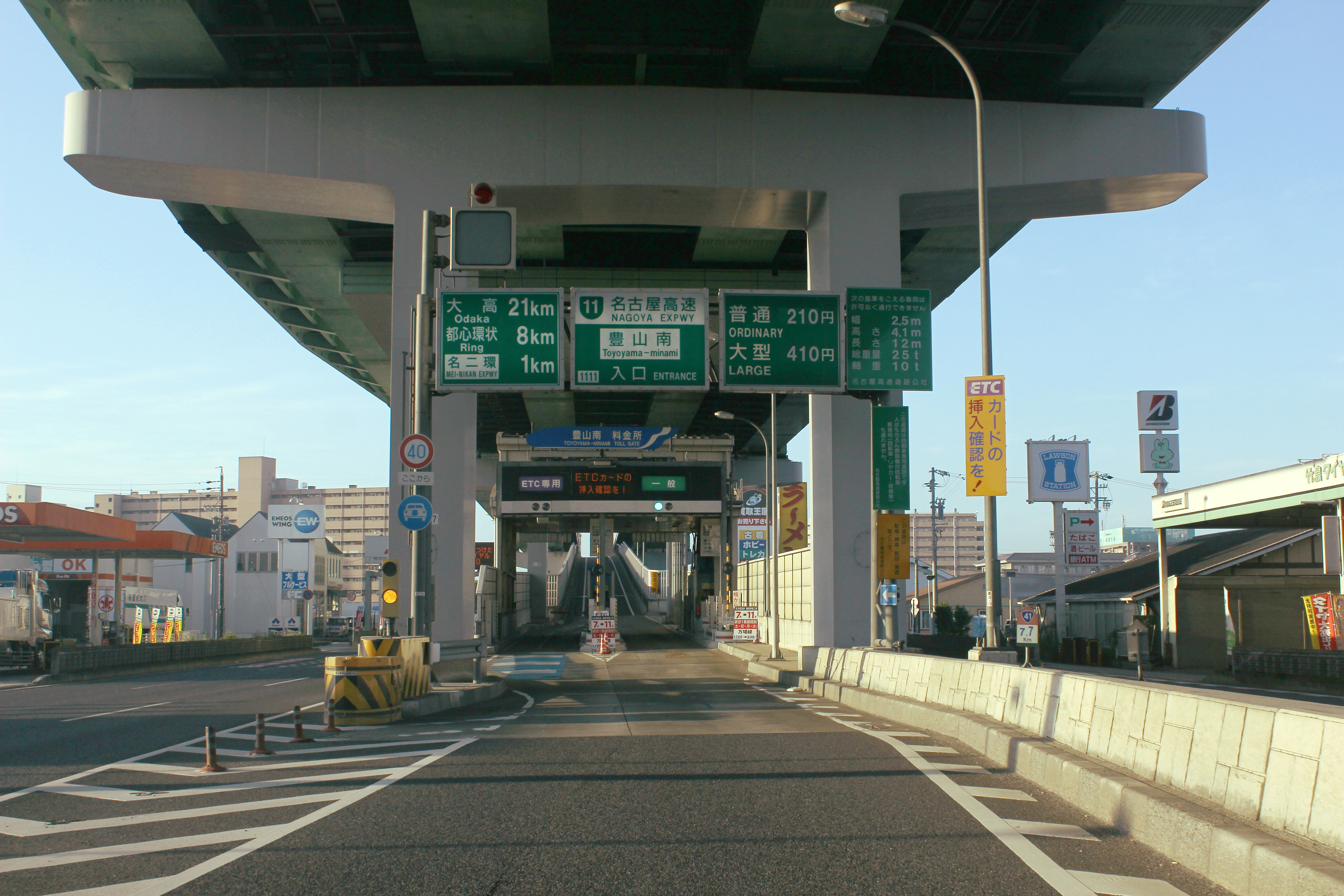 名古屋高速11号小牧線 豊山南入口